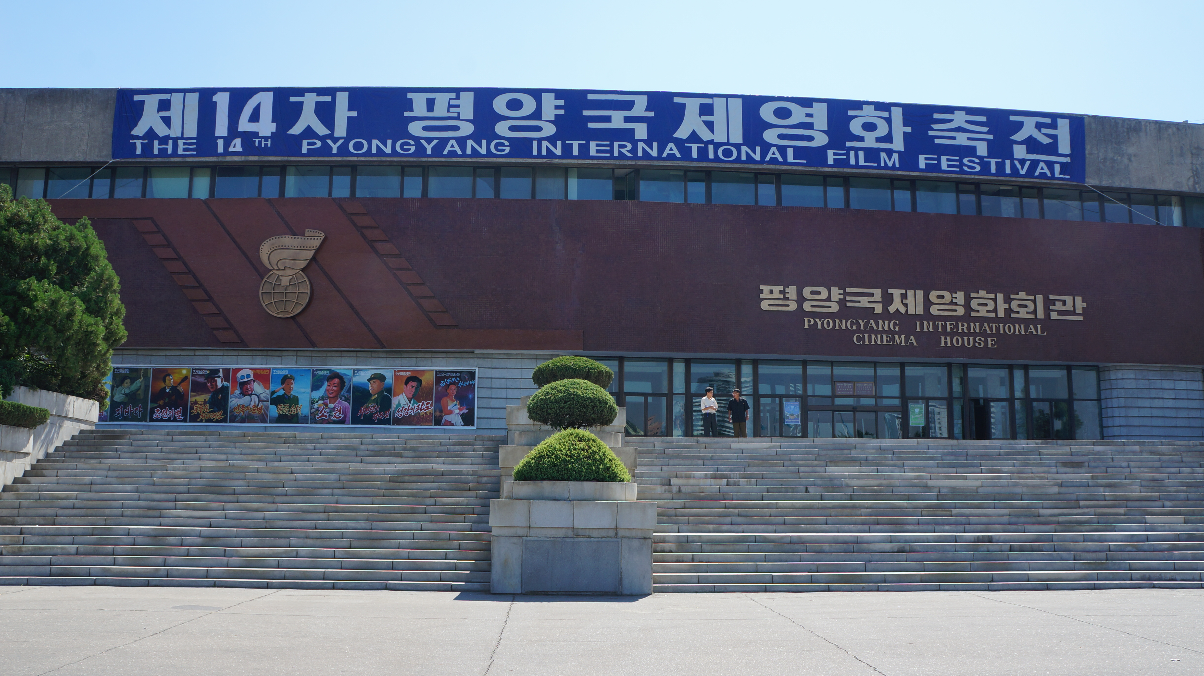 Pyongyang International Cinema House